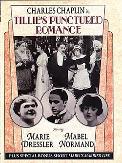 póster de la película Tillie´s Punctured Romance de 1914